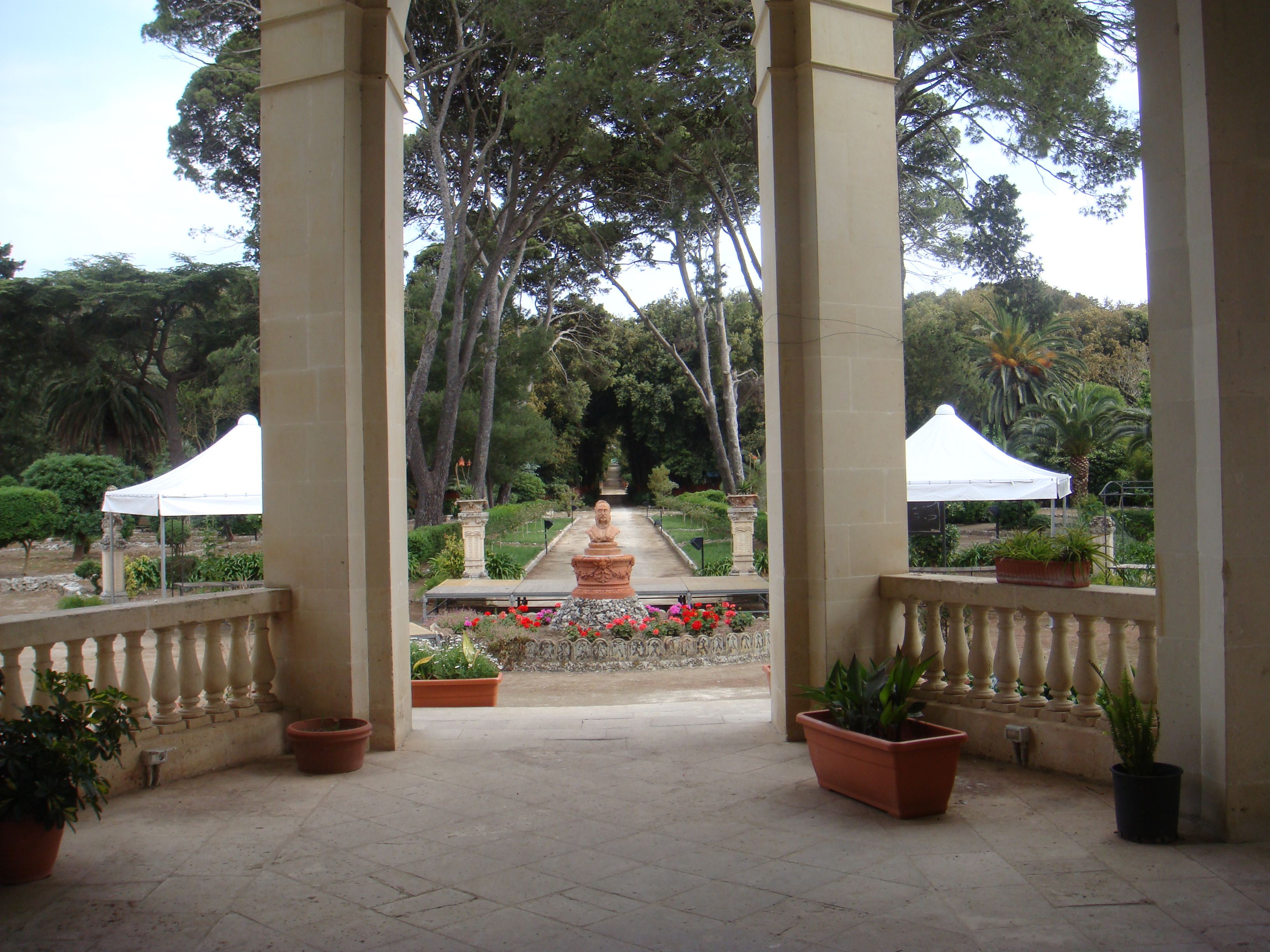 Villa Tamborino